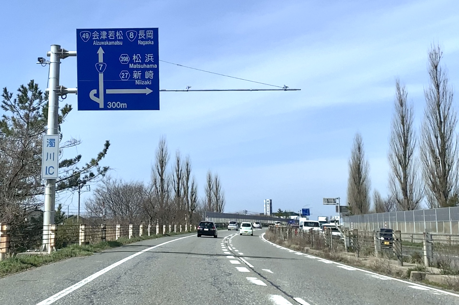 新新バイパス・濁川インターチェンジ（2020年3月）